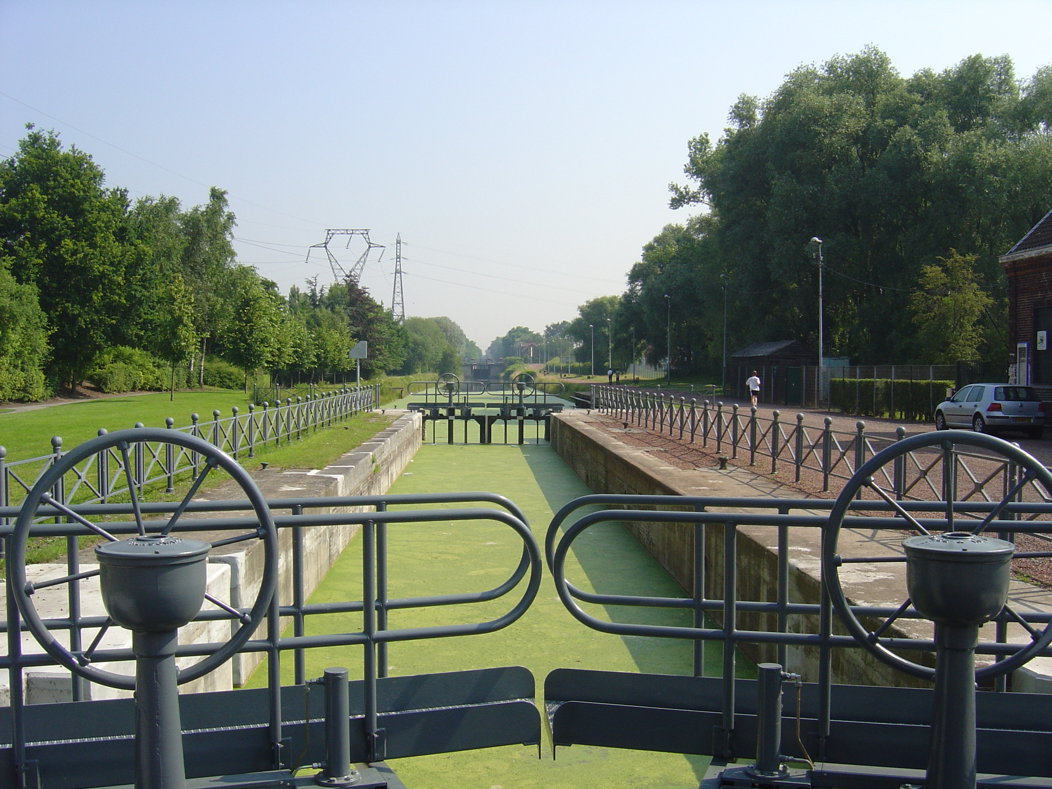 Ecluse du Triest à Wasquehal